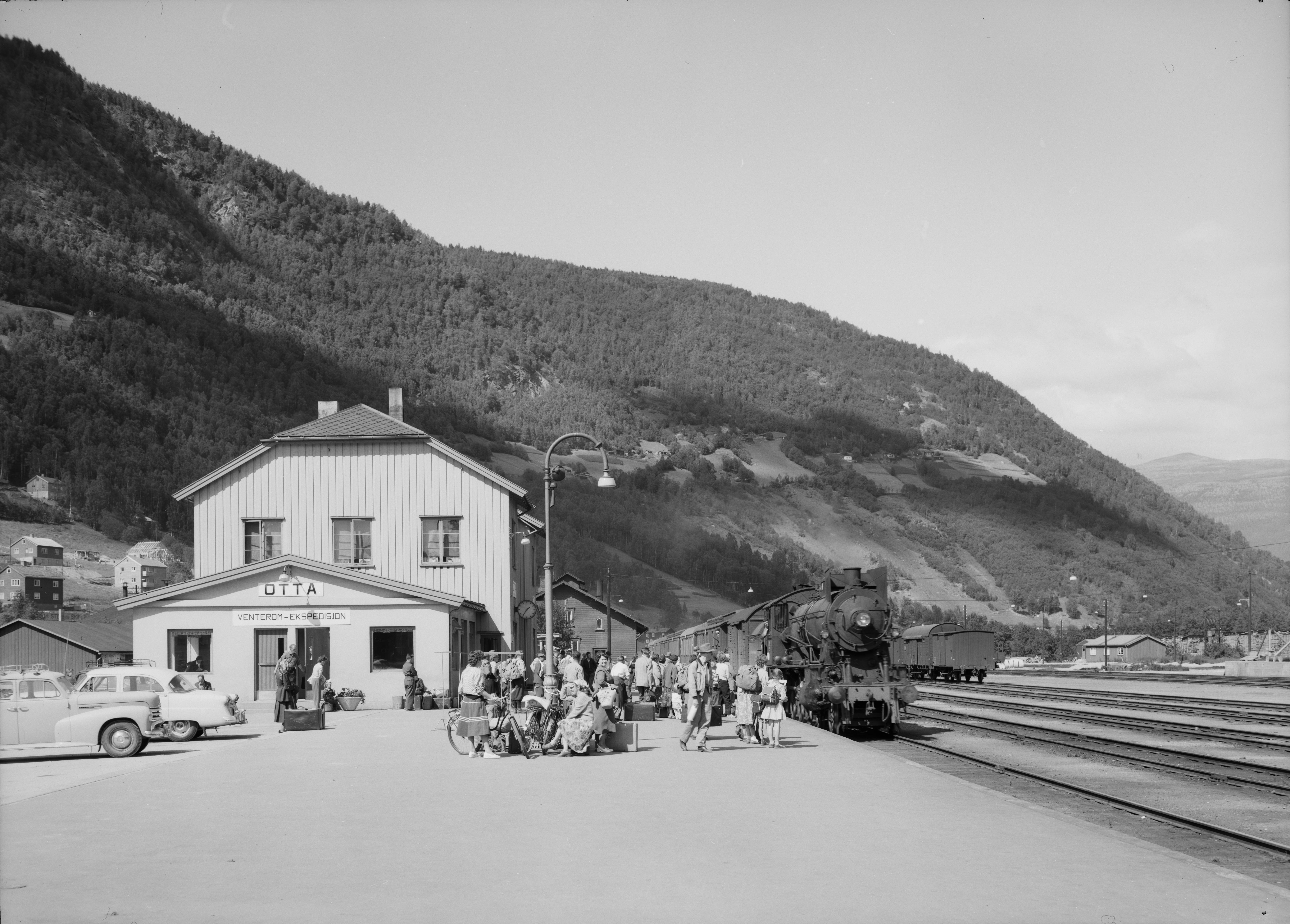 Bildet er hentet fra Nasjonalbibliotekets bildesamling Gudbrandsdalen,Otta, Sel, Oppland